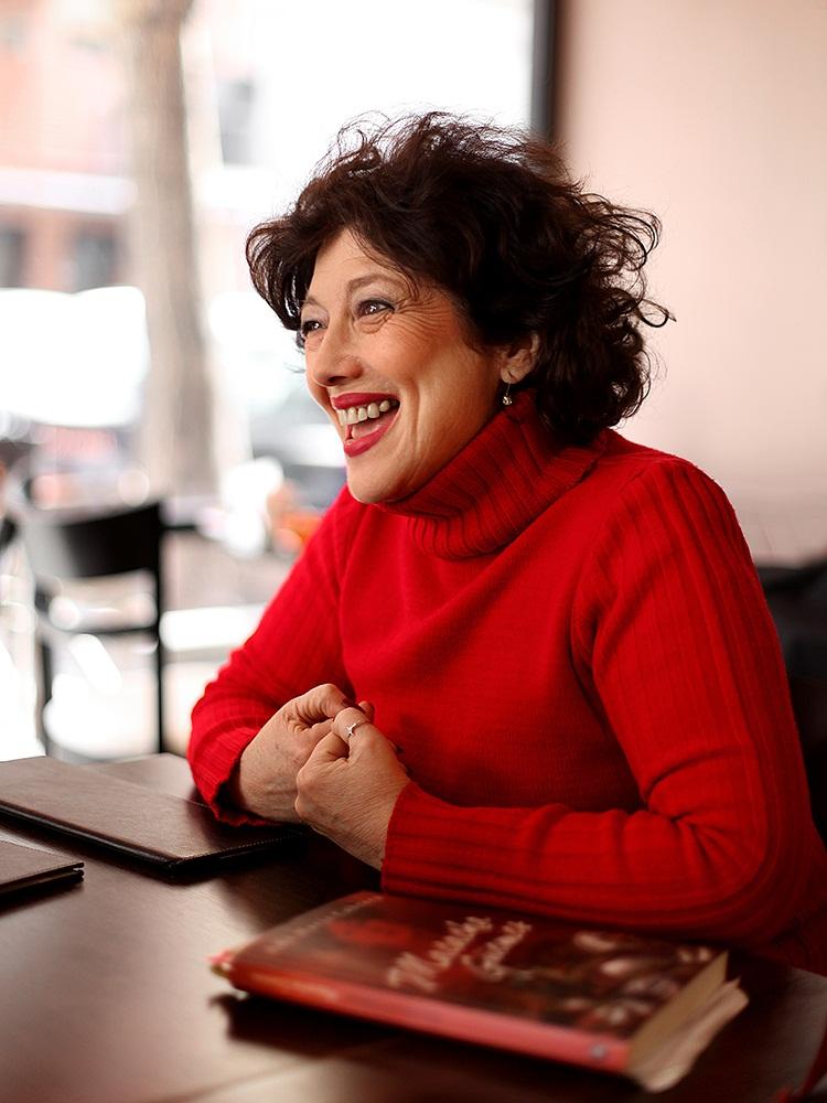 Conferencia de Ana María Cabrera.